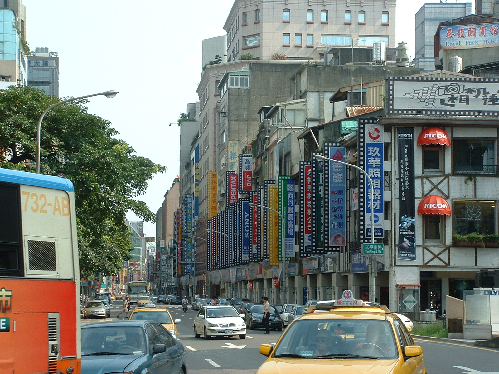 臺北市中正區博愛路與忠孝西路一段口，著名的相機街。